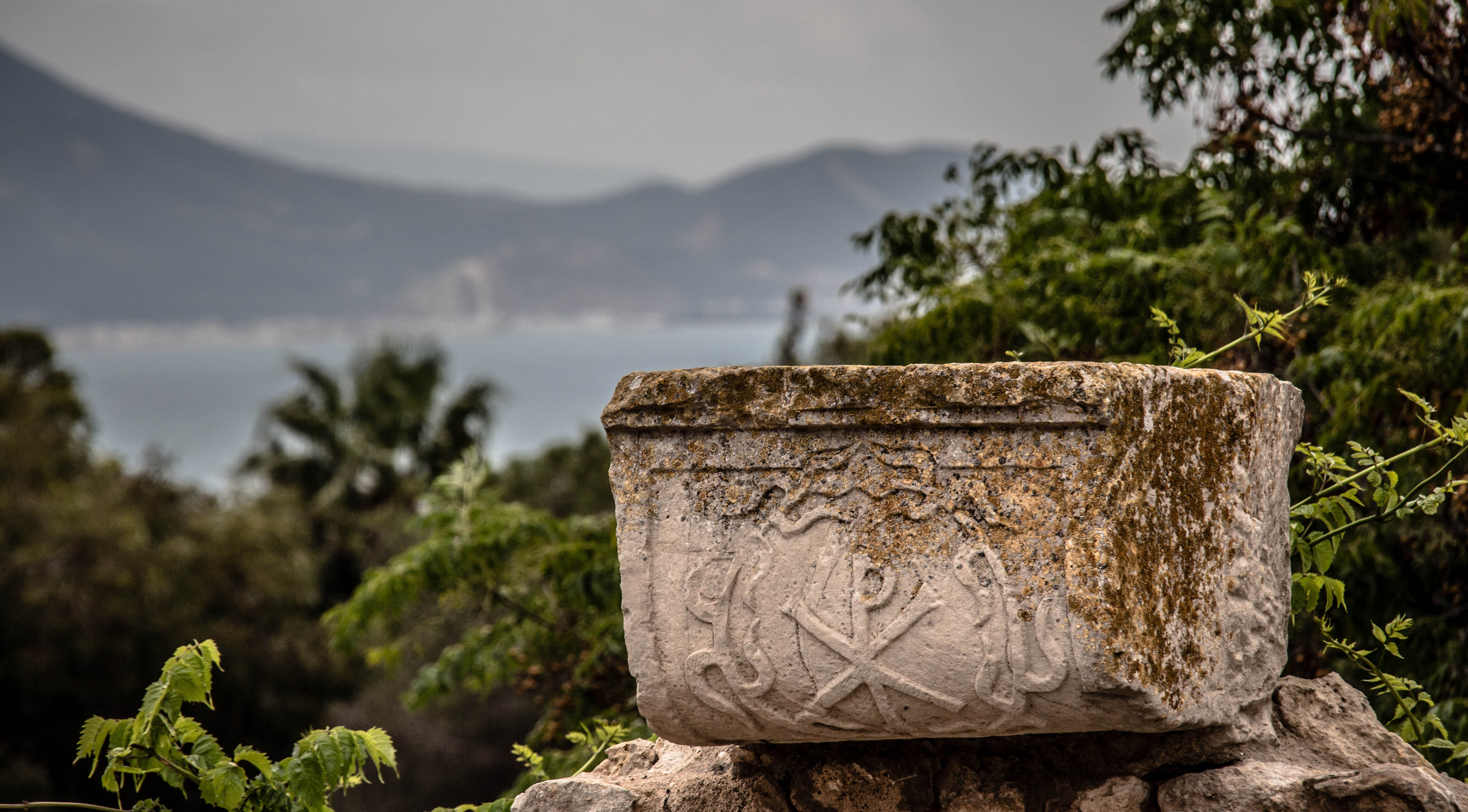 Chrisme sur une pierre à Carthage (Tunisie)